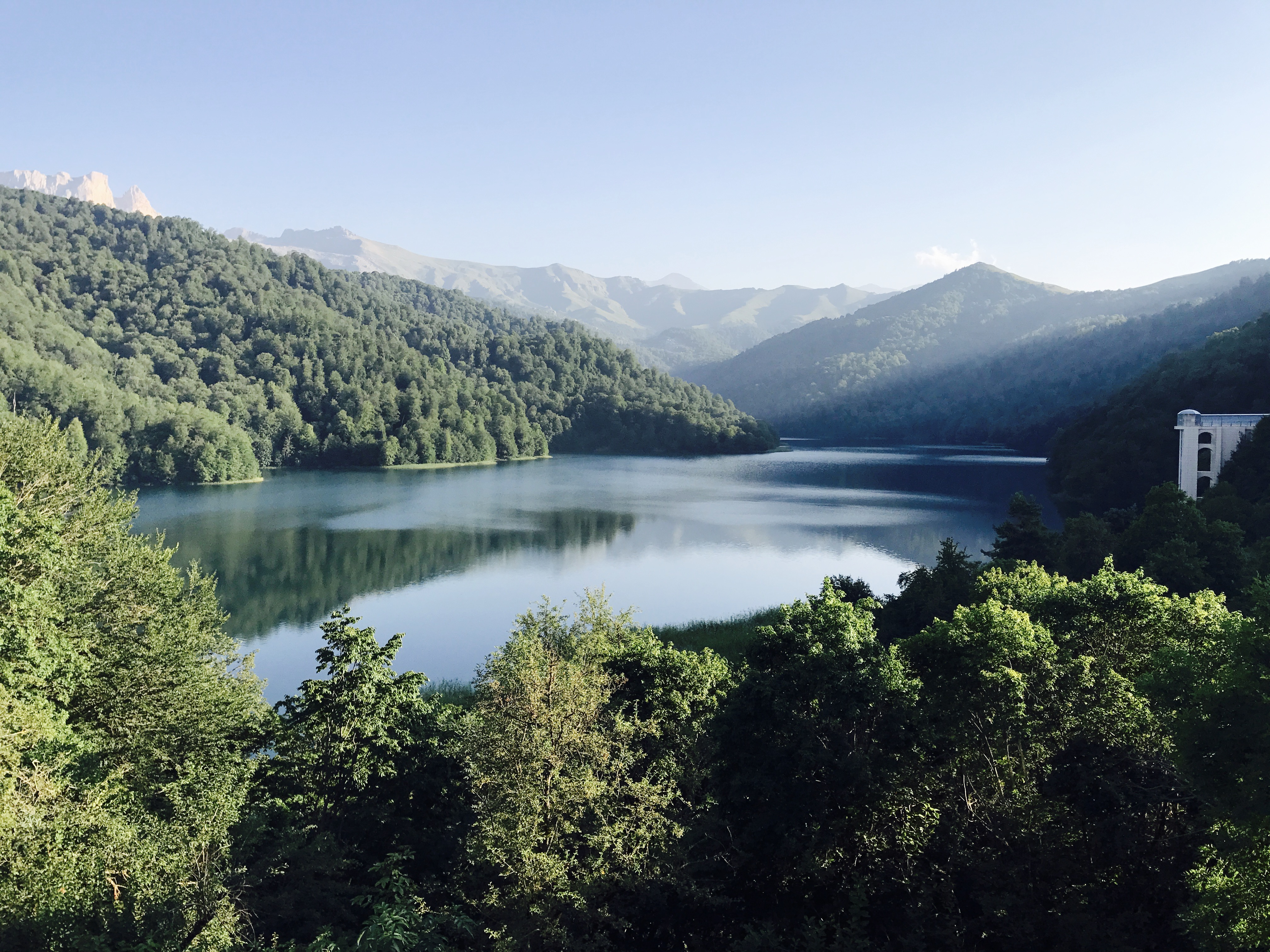 Goygol golu, Goygol rayonunda yerleshir. Azerbaycanin esrarengiz gollerinden birdir. 2017-ci ilde Gence basar zonasina seyahhetim vaxtinda chekmishem.